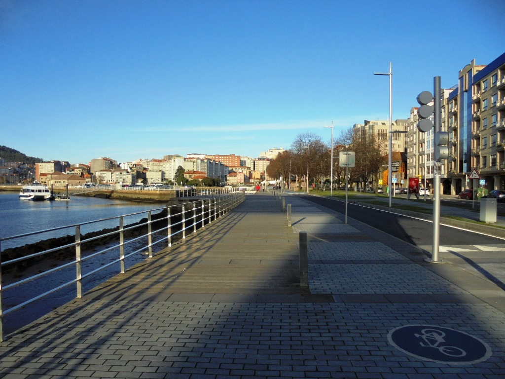 Paseo Marítimo en Pontevedra capital